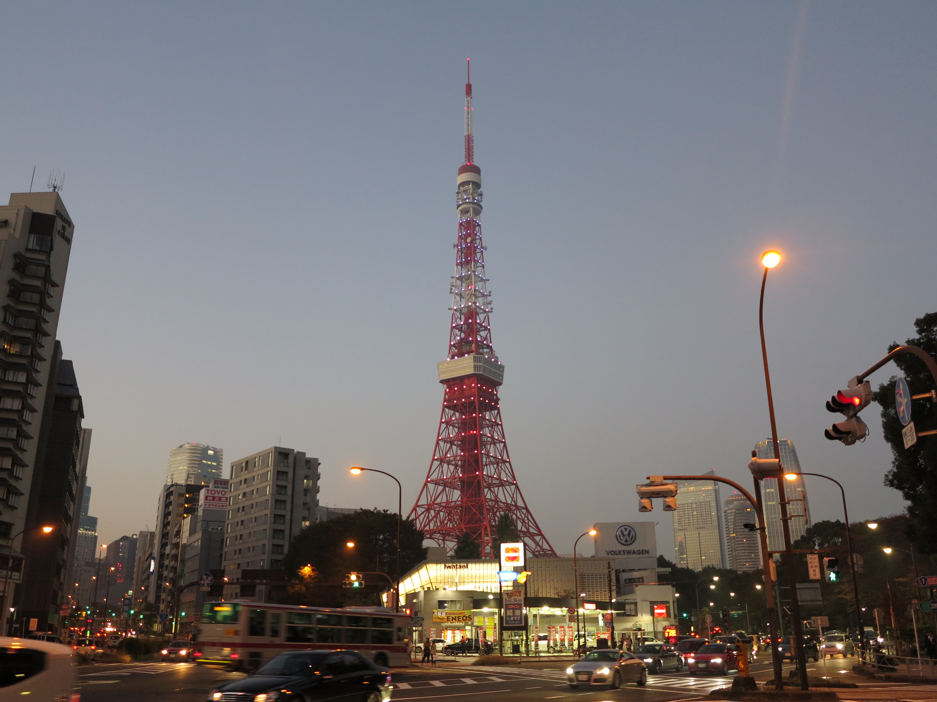 赤羽橋交差点から見た東京タワー